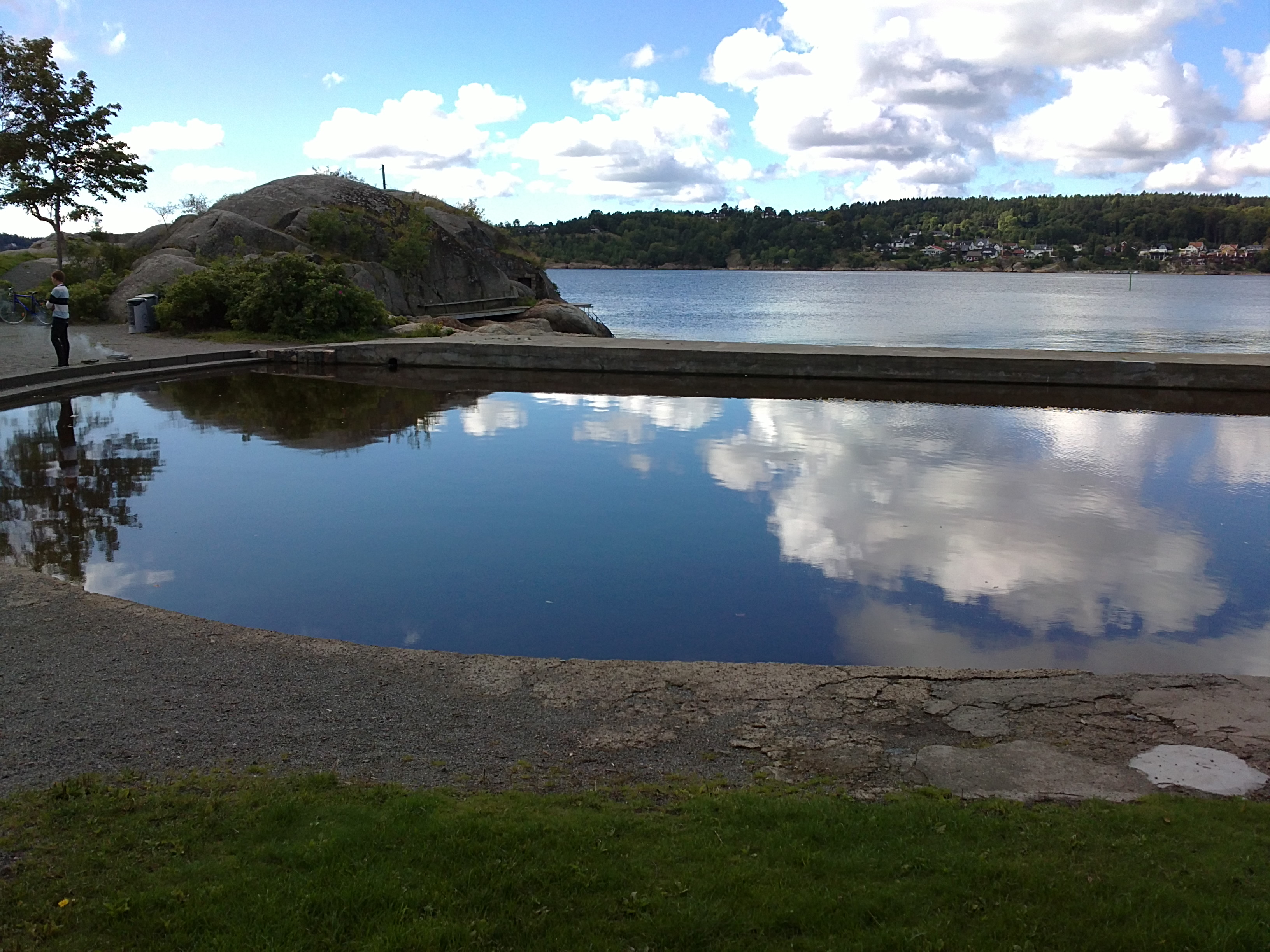 Bilde av Krabbedammen med Ballastberget i bakgrunnen